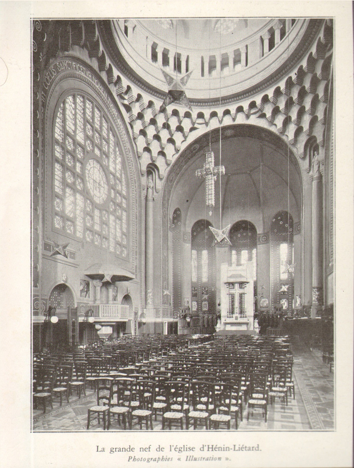 Intérieur de l'église Saint-Martin d'Hénin-Liétard, in L'Illustration, 1933.